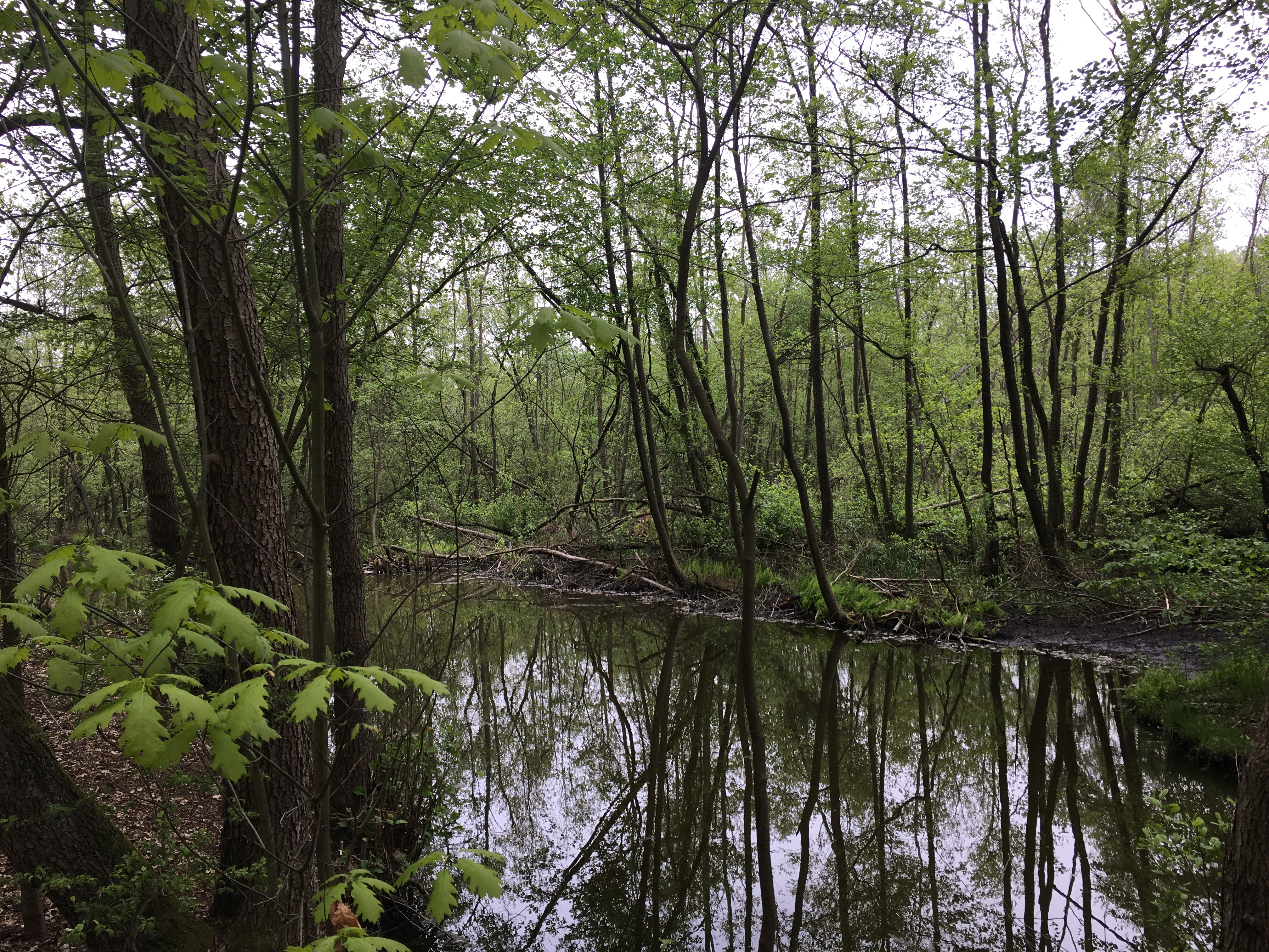 Die Töpchiner Seen sind ein rund 375 Hektar großes Naturschutzgebiet auf der Gemarkung der Stadt Mittenwalde im Landkreis Teltow-Fläming im Land Brandenburg